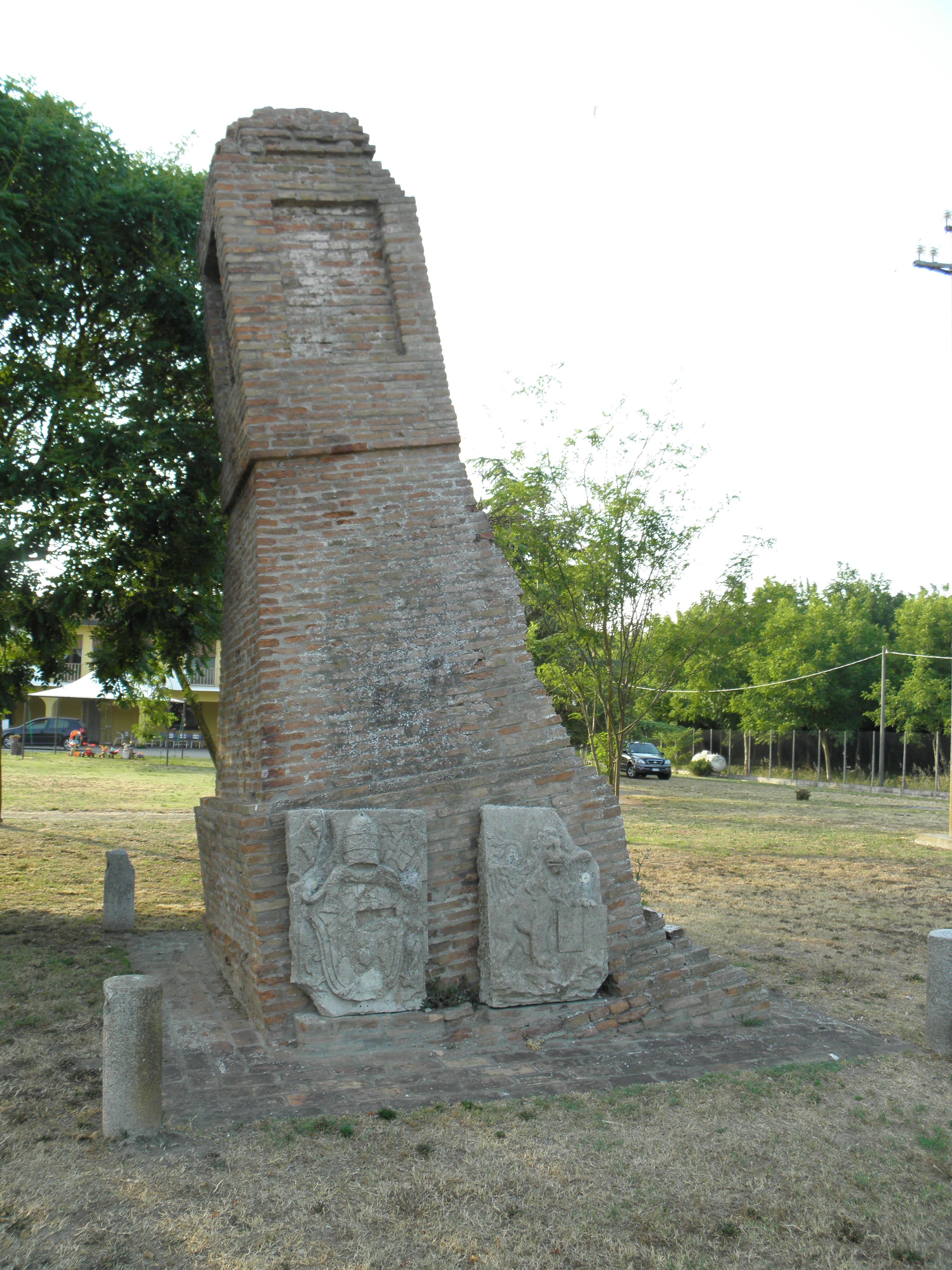 Torre, località nel comune di Ariano nel Polesine: il cippo che segnava il confine tra lo Stato Pontificio e la Repubblica di Venezia.